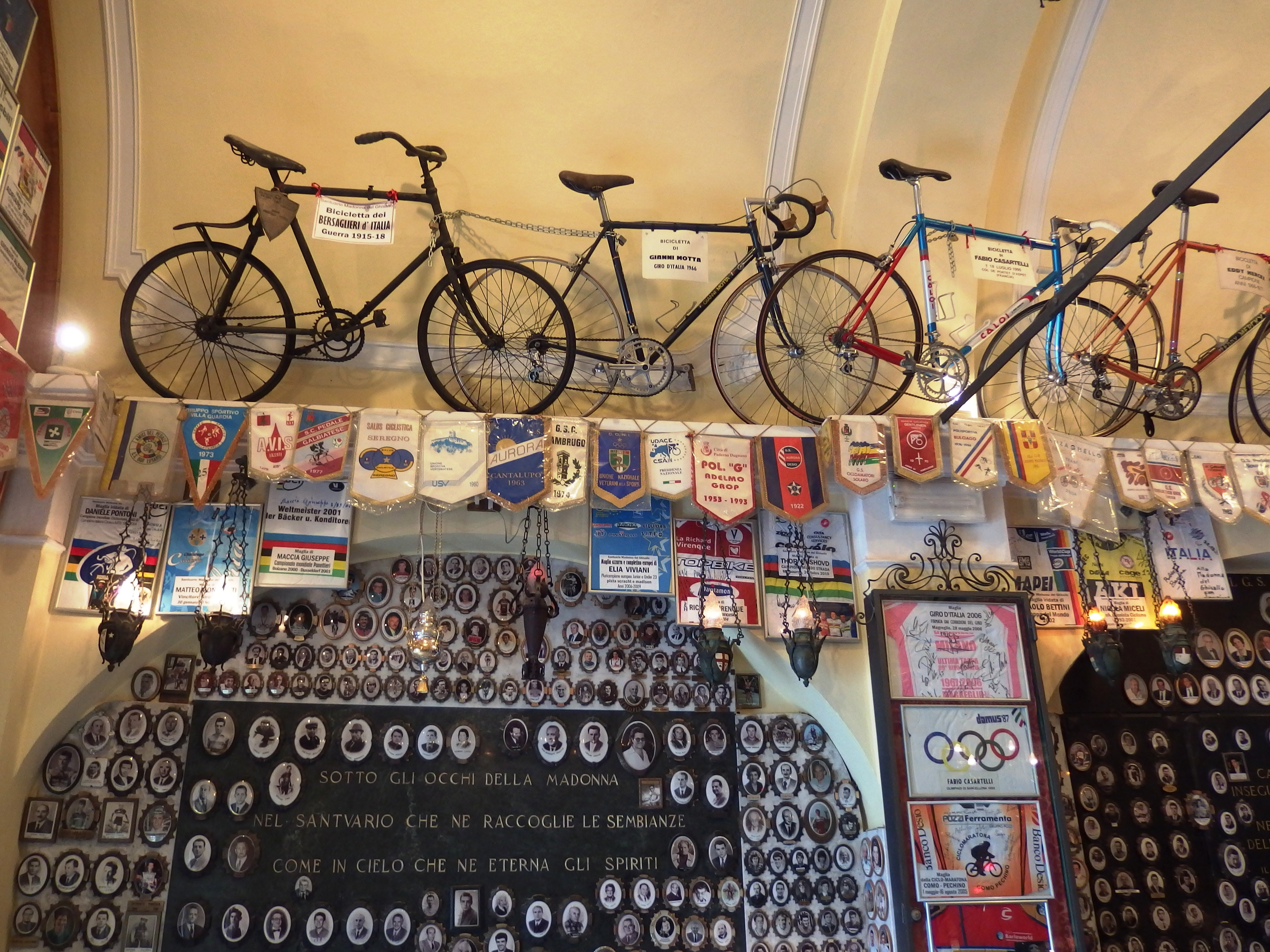 Kirche Madonna del Ghisallo in Magrelio